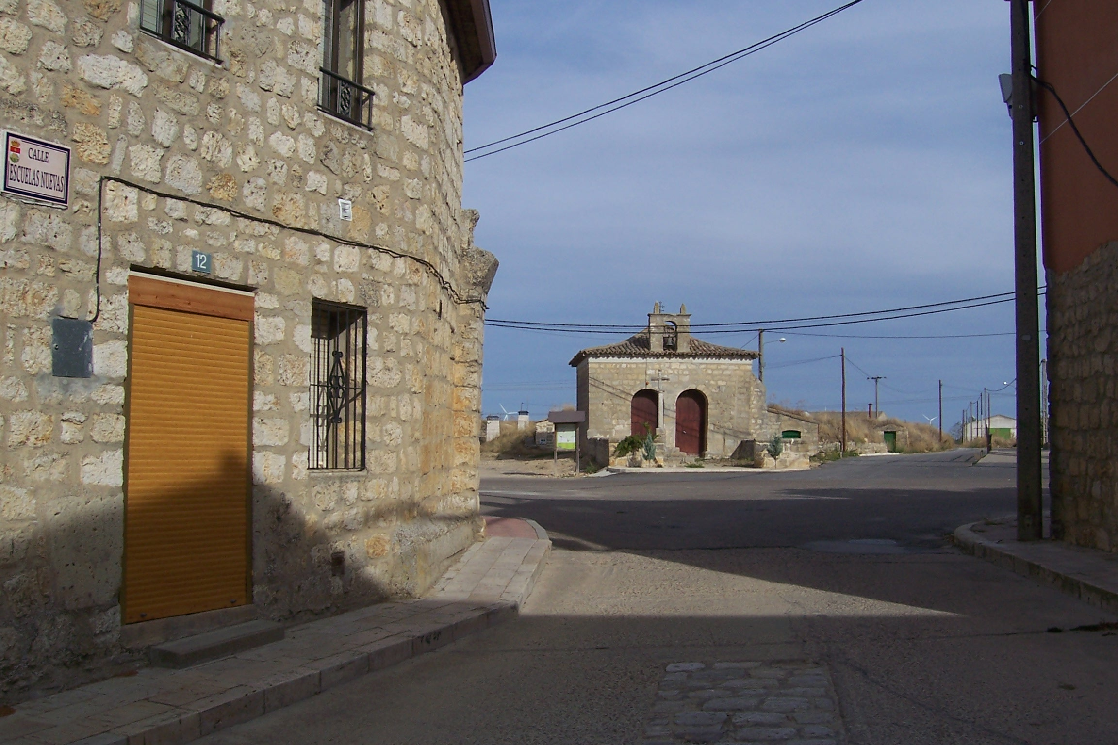 Villalba de los Alcores en la provincia de Valladolid, España. Arquitectura popular. Calle de las Escuelas Nuevas con el Humilladero al fondo.